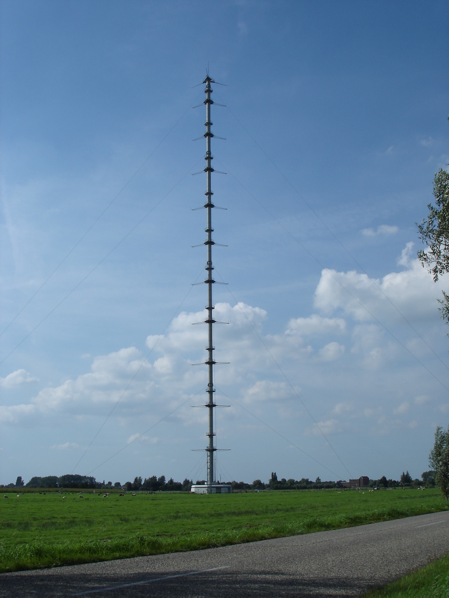 Meetmast Cabauw